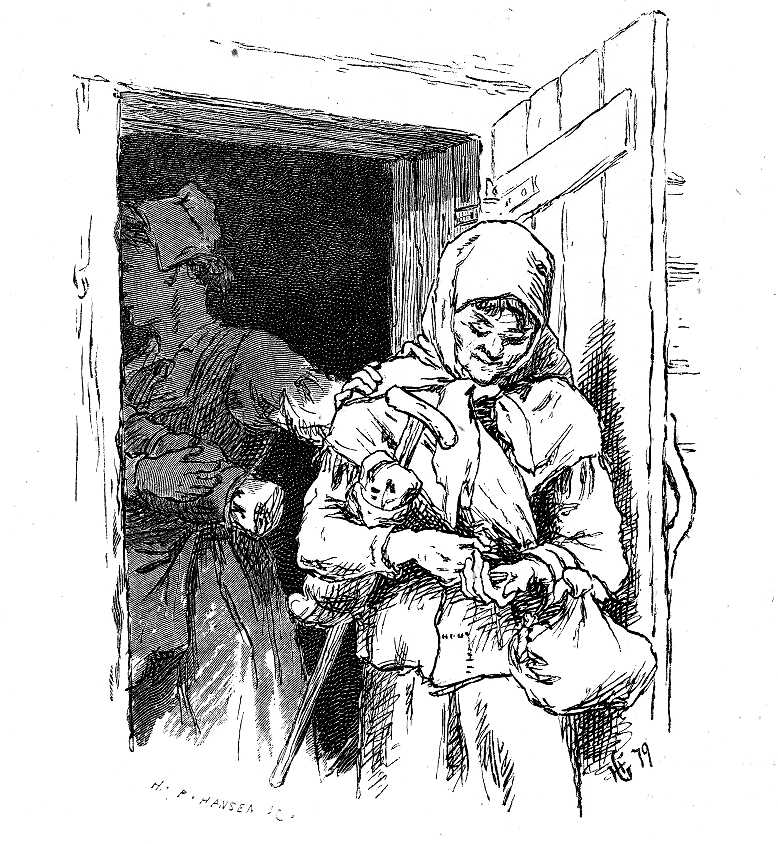 Illustration for the Norwegian fairy tale "En signekjærring" in Norske folke- og huldre-eventyr from 1879